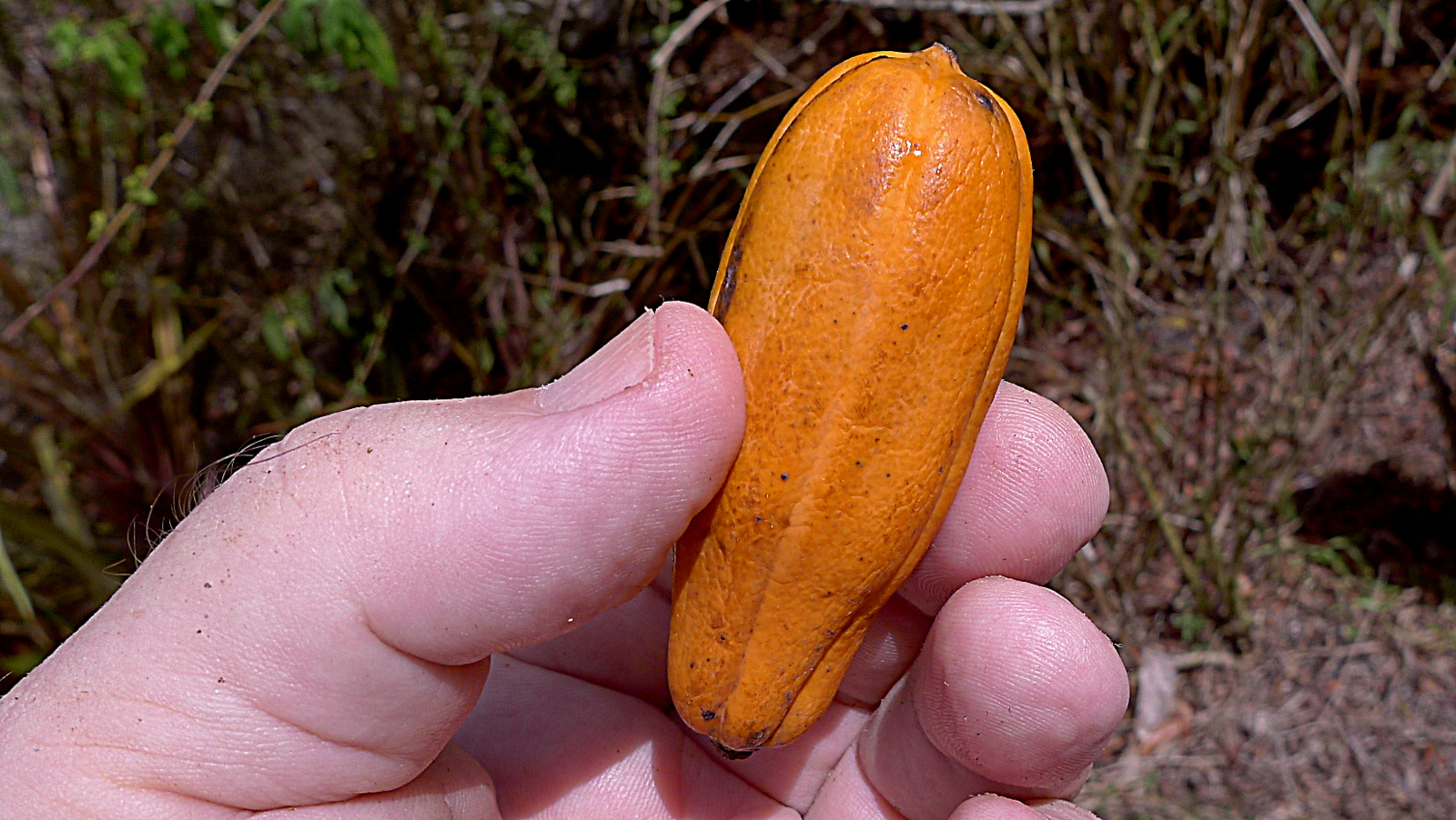 Jacaratia spinosa (Aubl.) A.DC.